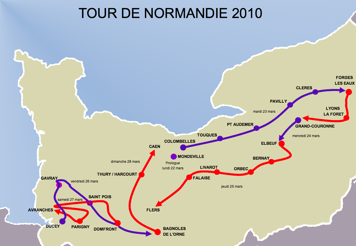 Étapes du tour cycliste de Normandie 2010.